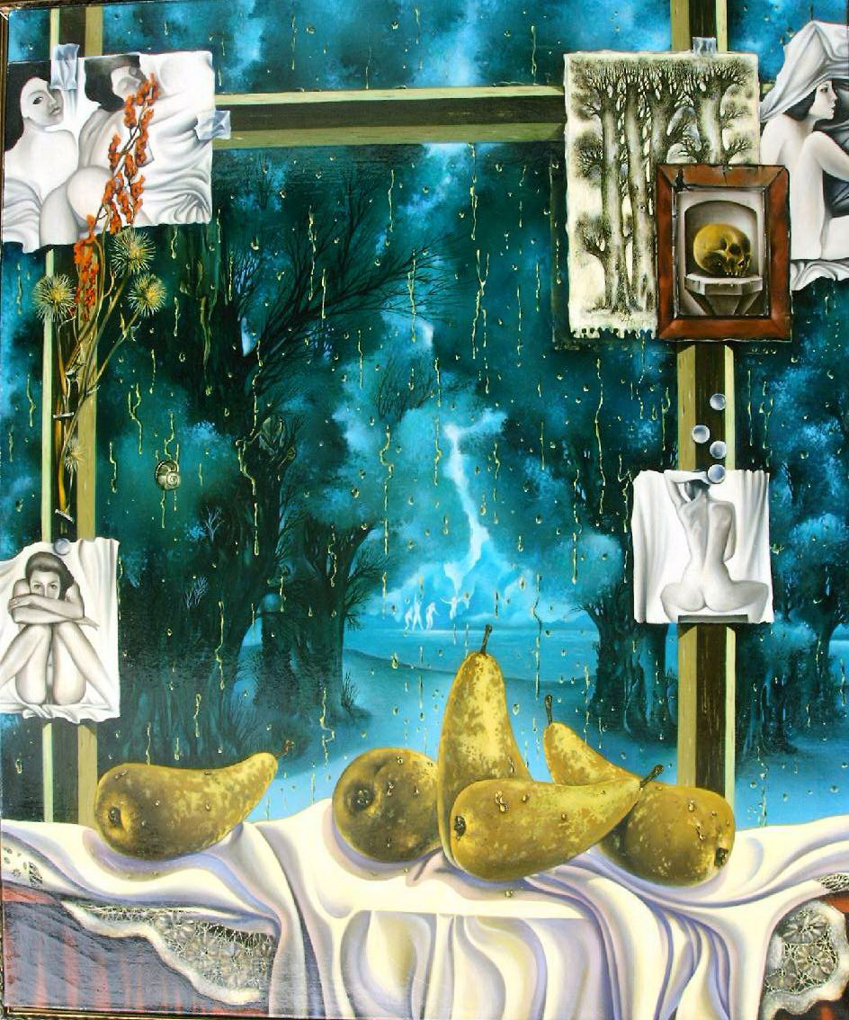 Картина художника Виктора Цветкова «Натюрморт в ателье», 1991 год.